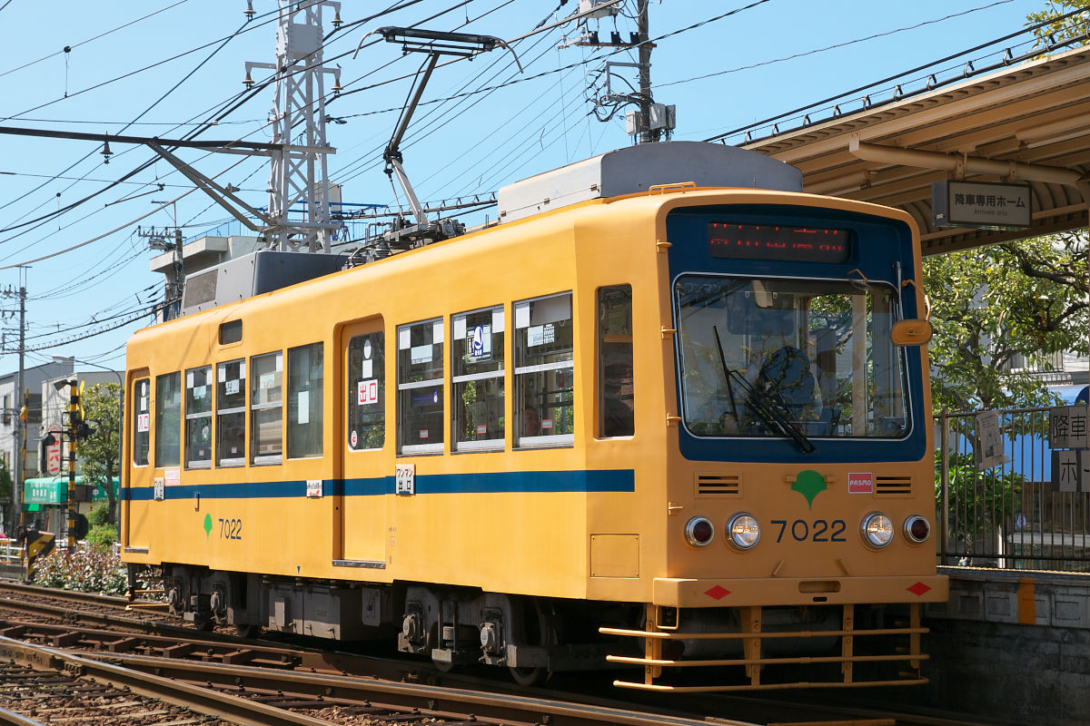 都電荒川線7000形（7022号）、荒川車庫前。